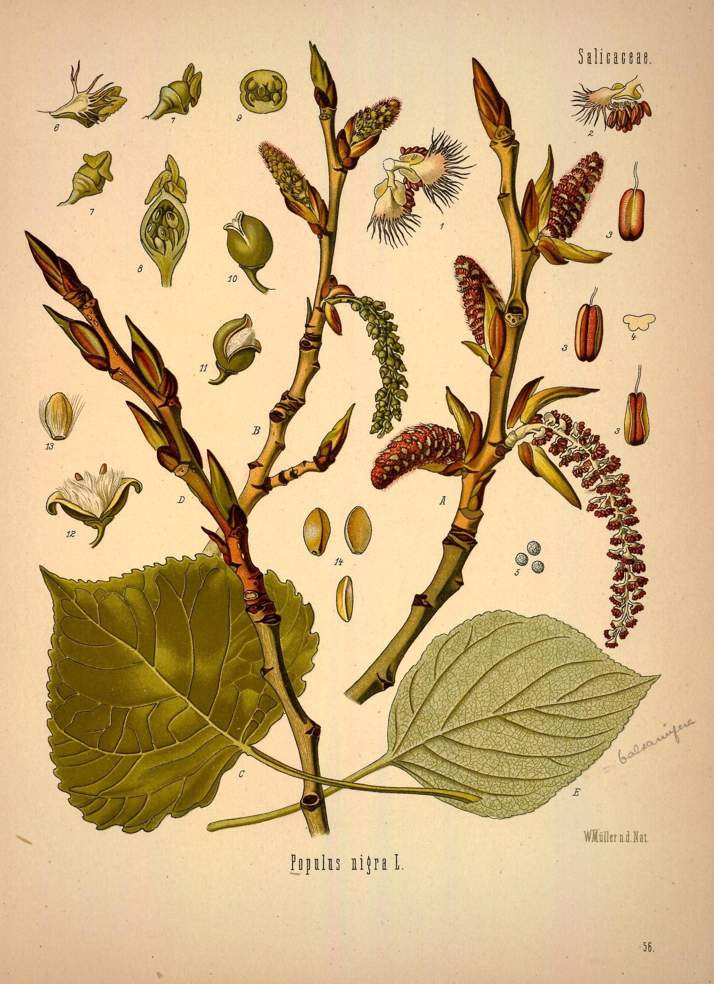 Schwarzpappel. A männlicher, B weiblicher Blüthenzweig, natürl. Grösse; C Blatt von Pop. nigra, desgl.; D Zweig mit Knospen, desgl.; E Blatt von Pop. italica, desgl.; 1 u. 2 männliche Blüthe, vergrössert; 3 Staubgefässe von verschiedenen Seiten, desgl.; 4 Beutel im Querschnitt, desgl.; 5 Pollen, desgl.: 6 weibliche Blüthe mit Deckschuppe, desgl.; 7 dieselbe ohne Deckschuppe, desgl.; 8 Fruchtknoten im Längsschnitt, desgl.; 9 derselbe im Querschnitt, desgl.; 10 u. 11 Frucht, desgl.; 12 dieselbe geöffnet, desgl.; 13 Same, desgl.